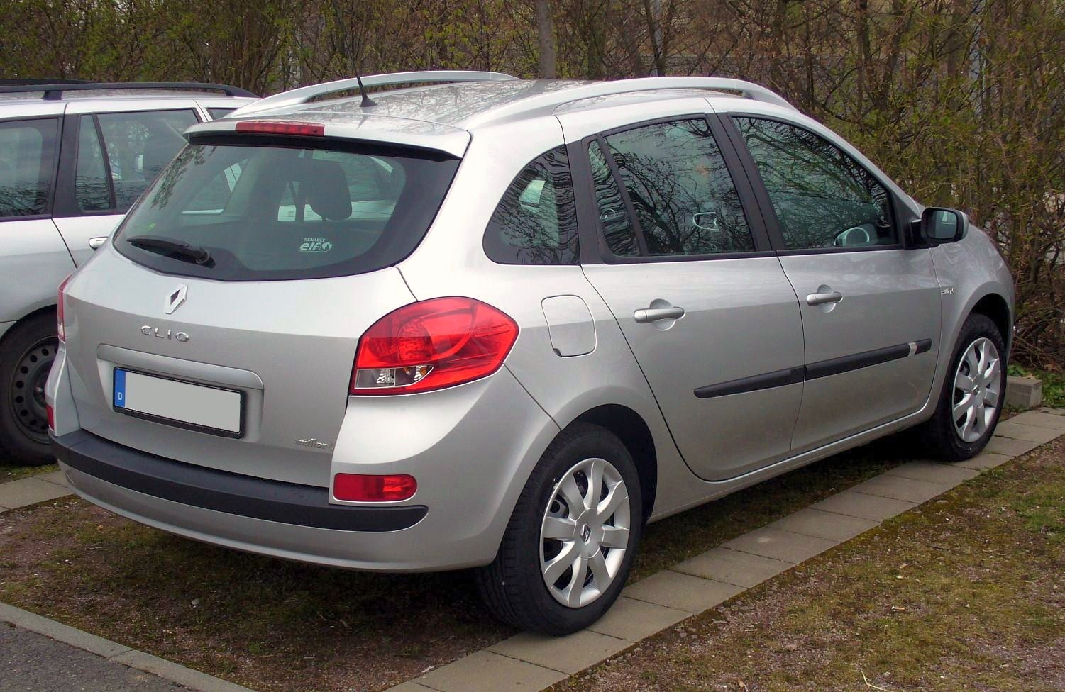 Renault Clio Grandtour